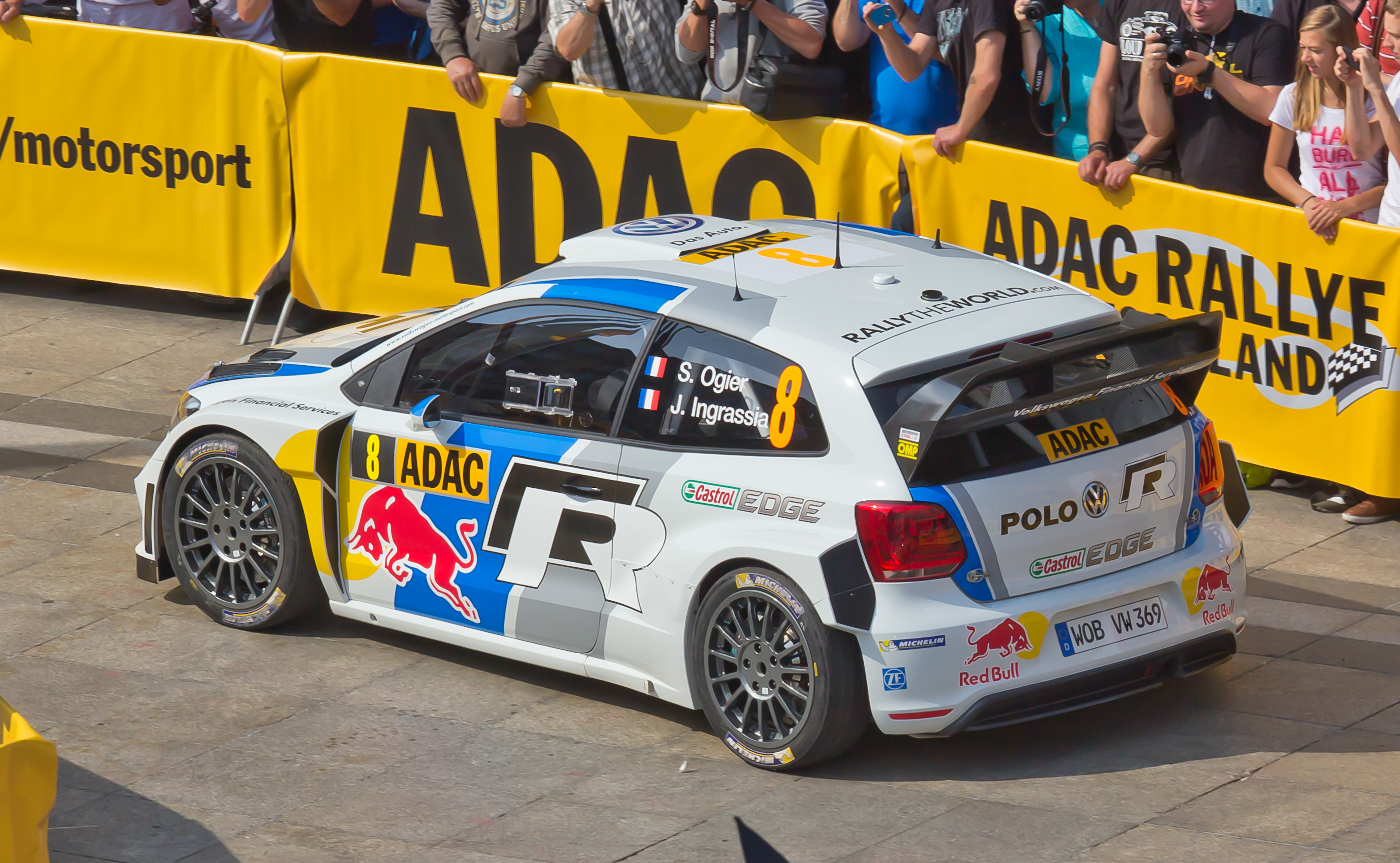 ADAC Rallye Deutschland 2013 - Fahrerpräsentation auf dem Roncalliplatz.Team Volkswagen Motorsport mit dem Fahrer Sébastien Ogier und Co-Fahrer Julien Ingrassia im VW Polo R WRC